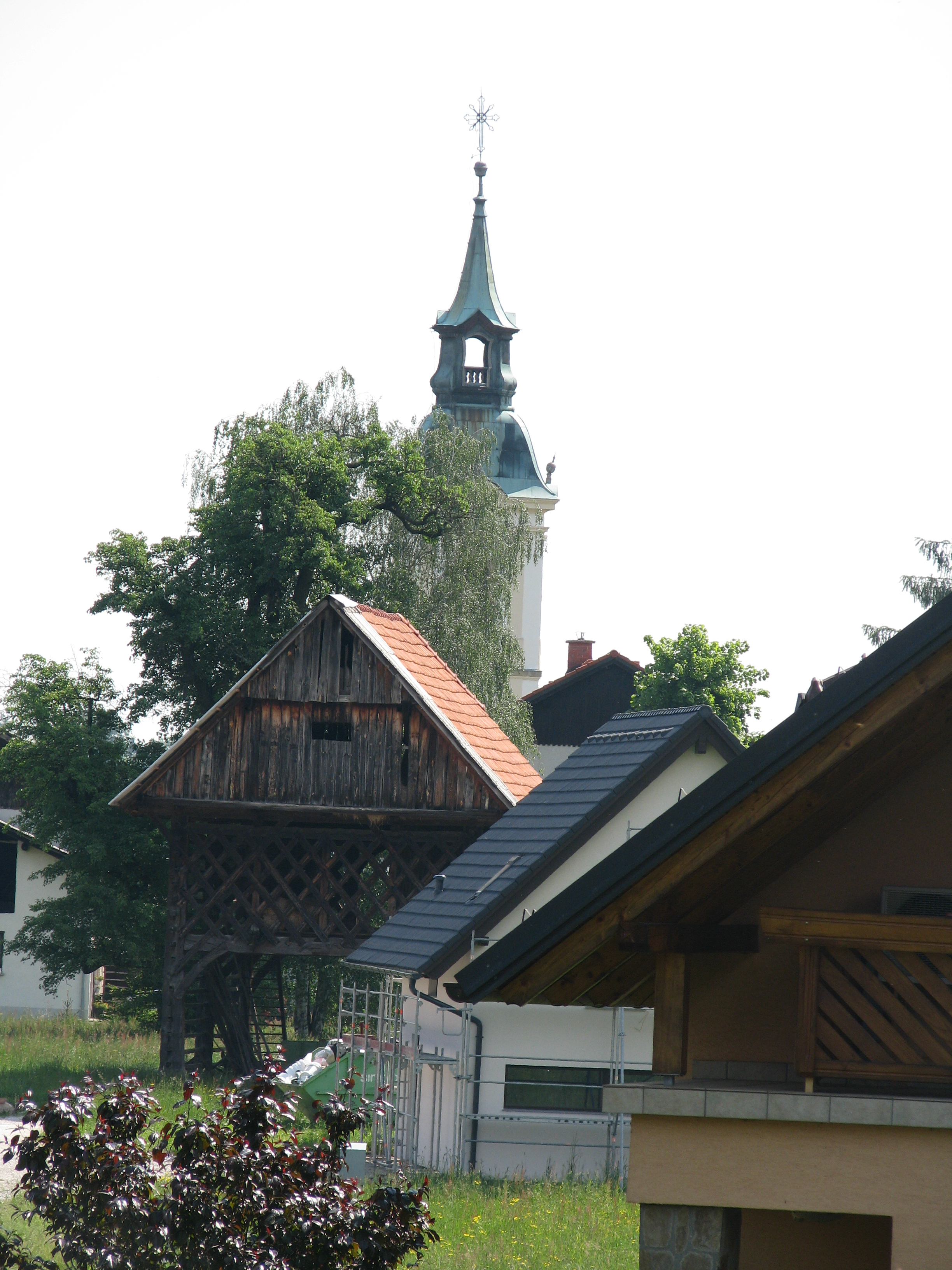 Vas Sveti Lovrenc v občini Prebold